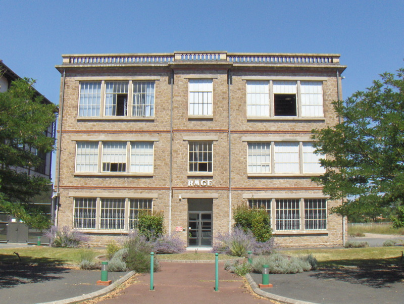 Anciens bureaux de la centrale. Les bâtiments ont été désaffectés par les houillères en 1988. Mais la centrale électrique fonctionne toujours, gérée par la Régie municipale du gaz et électricité.